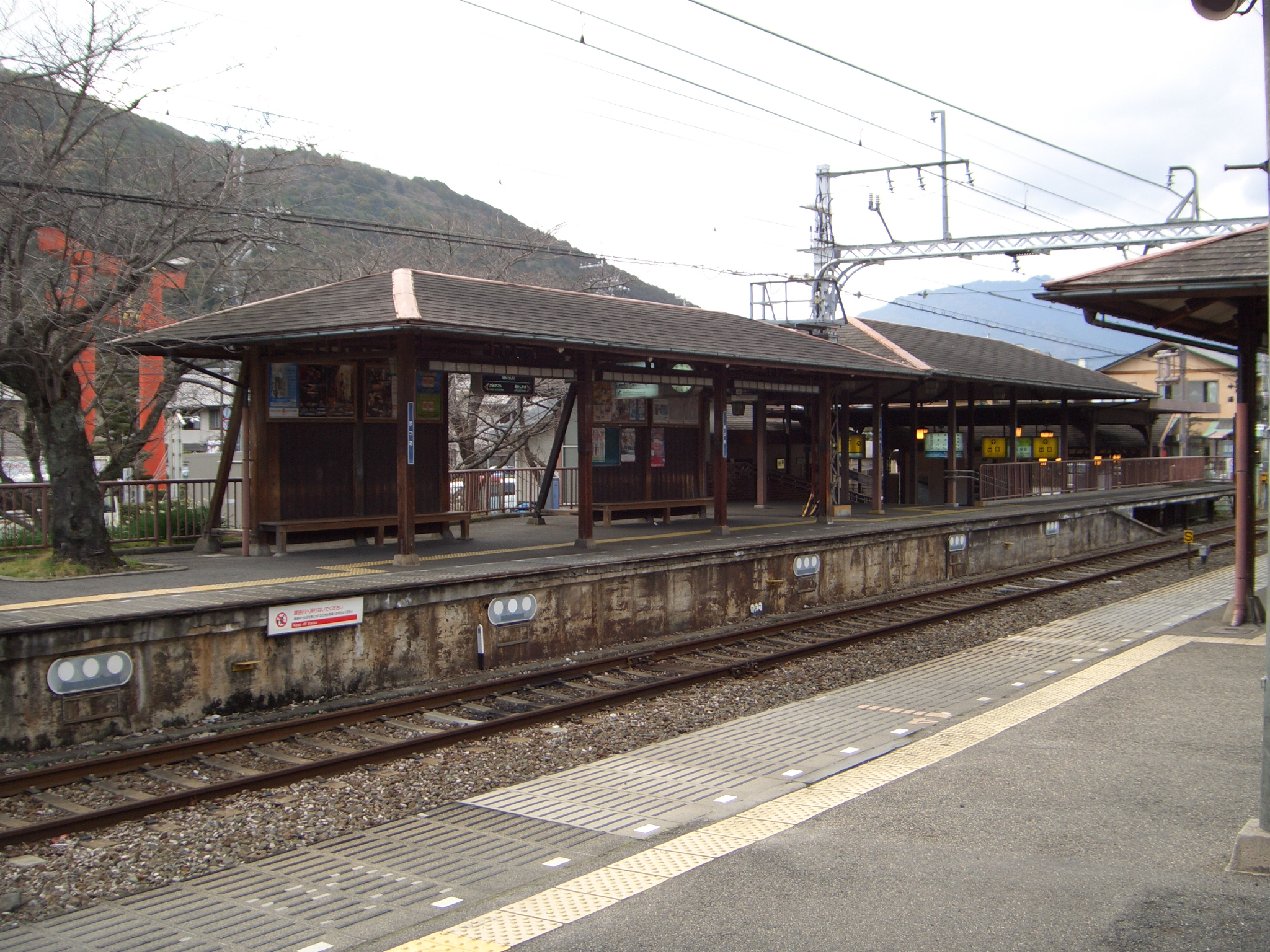 阪急電鉄嵐山線松尾大社駅。京都市西京区。 嵐山方面のりば旅客上屋。